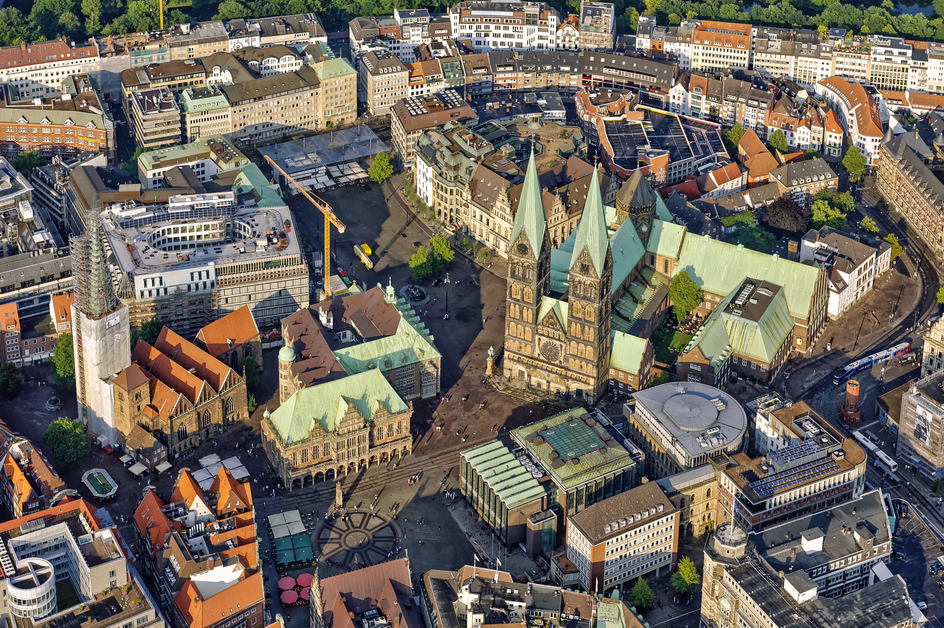 Bremens gute Stube von Oben